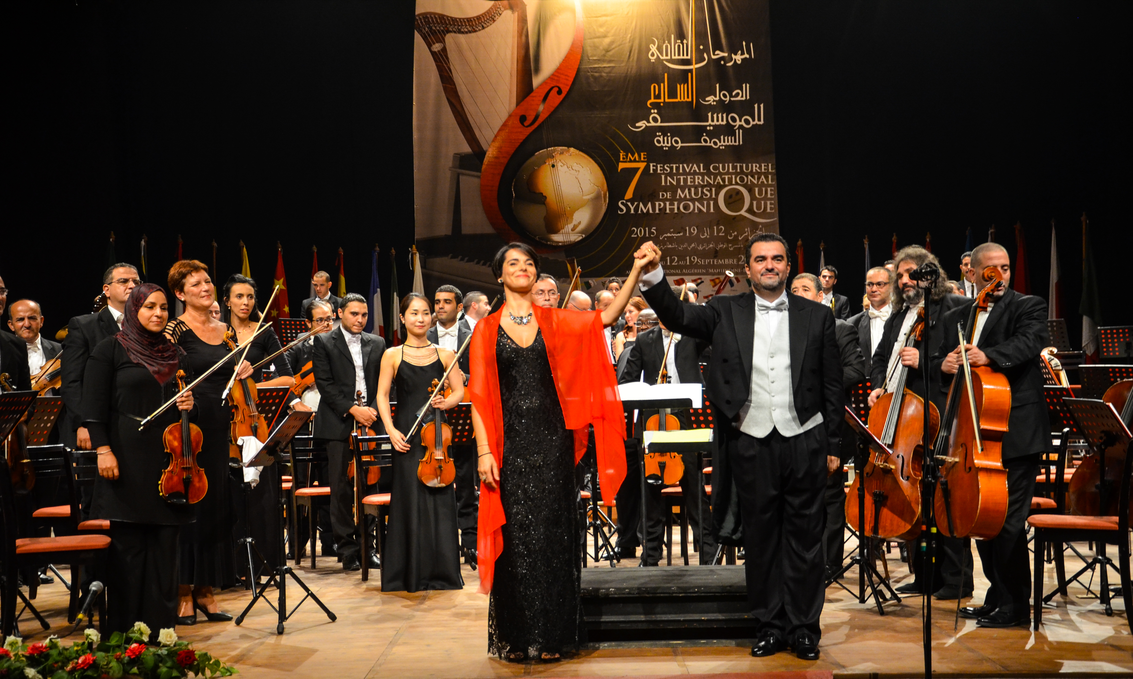 Festival international de musique symphonique d'Alger 2015 au TNA This is an image of "African people at work" from Algeria